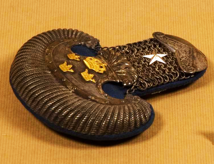 Epålett m/1895 för underlöjtnant vid Livregementets dragoner (K 2).